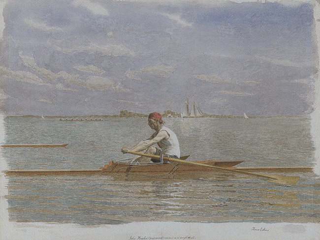 John Biglin in a Single Scull